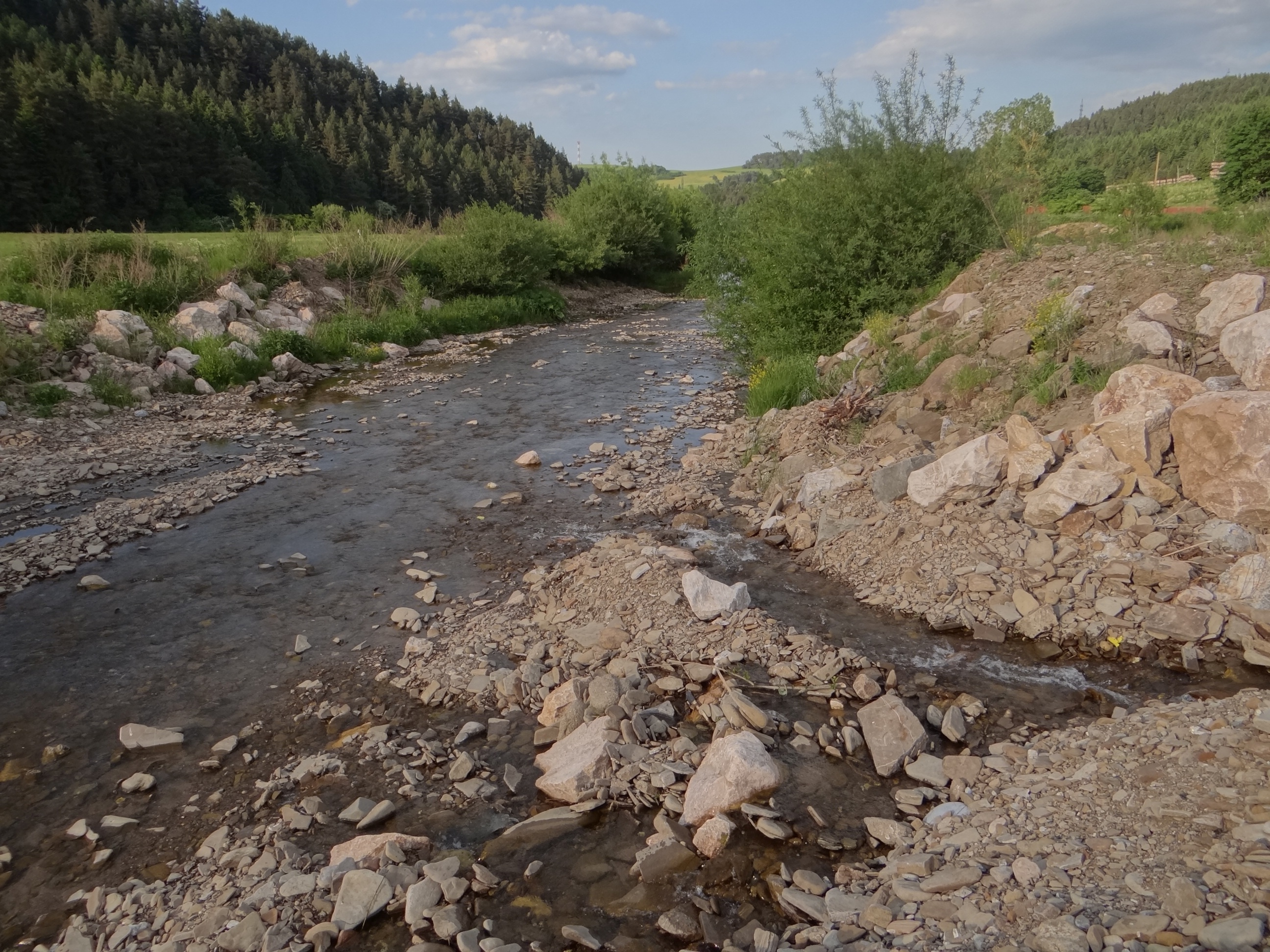 Šambron